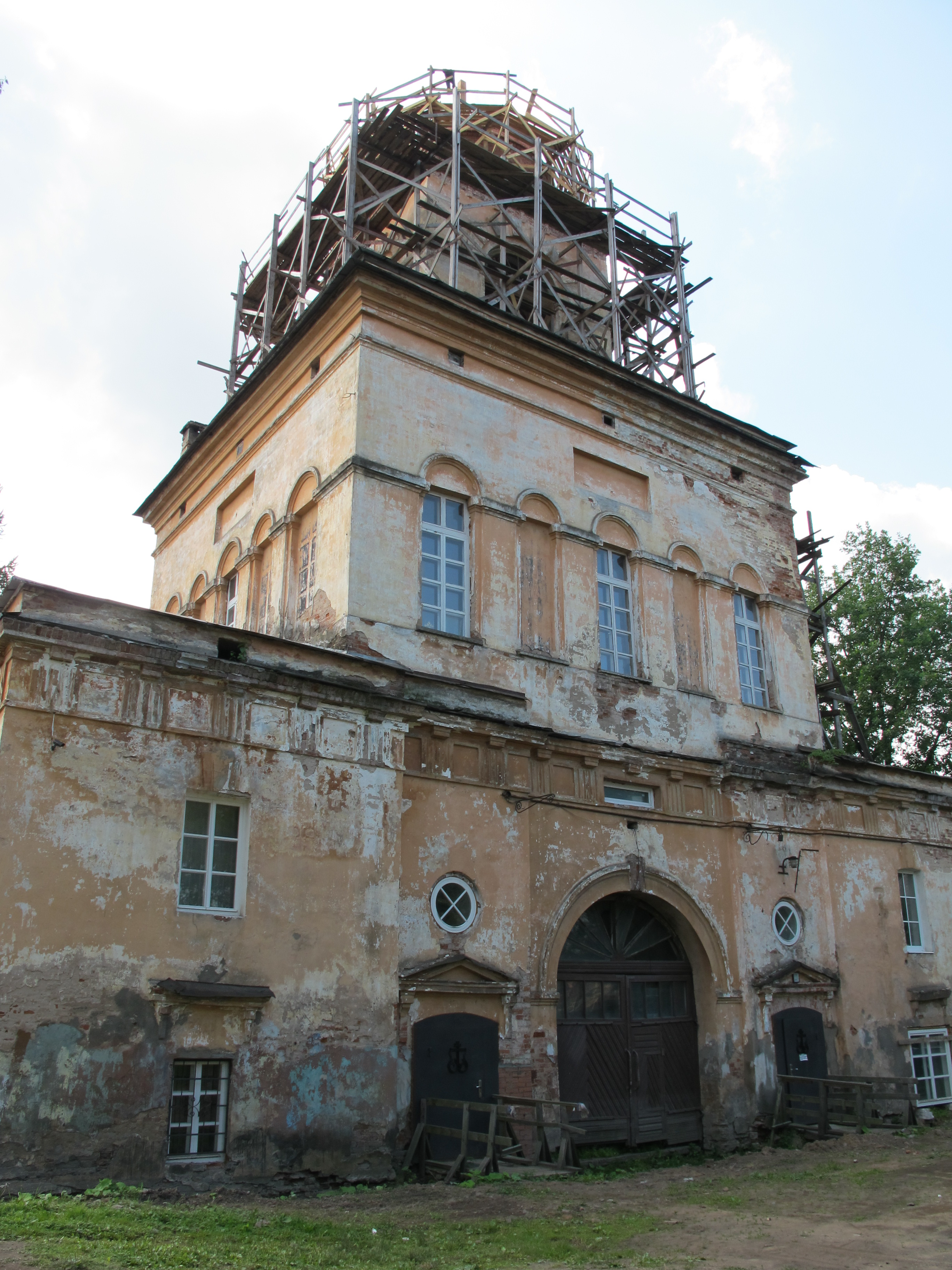 Монастырь Введенский женский (Санкт-Петербург и Лен.область, Тихвин, Зайцева улица, 8)